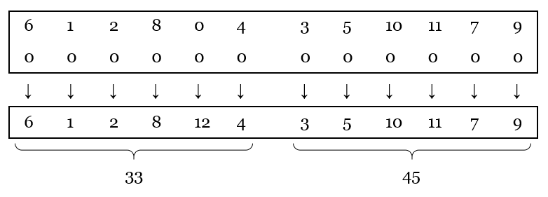 Gerhard string quartet 1 - conversió d'una sèrie numèrica a valors de temps